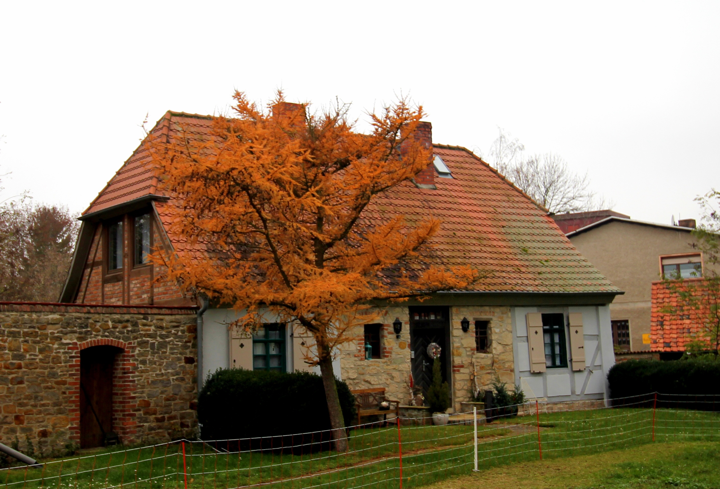 Pfarrhof Dr.-Hübener-Straße 37, 38 Bottmersdorf